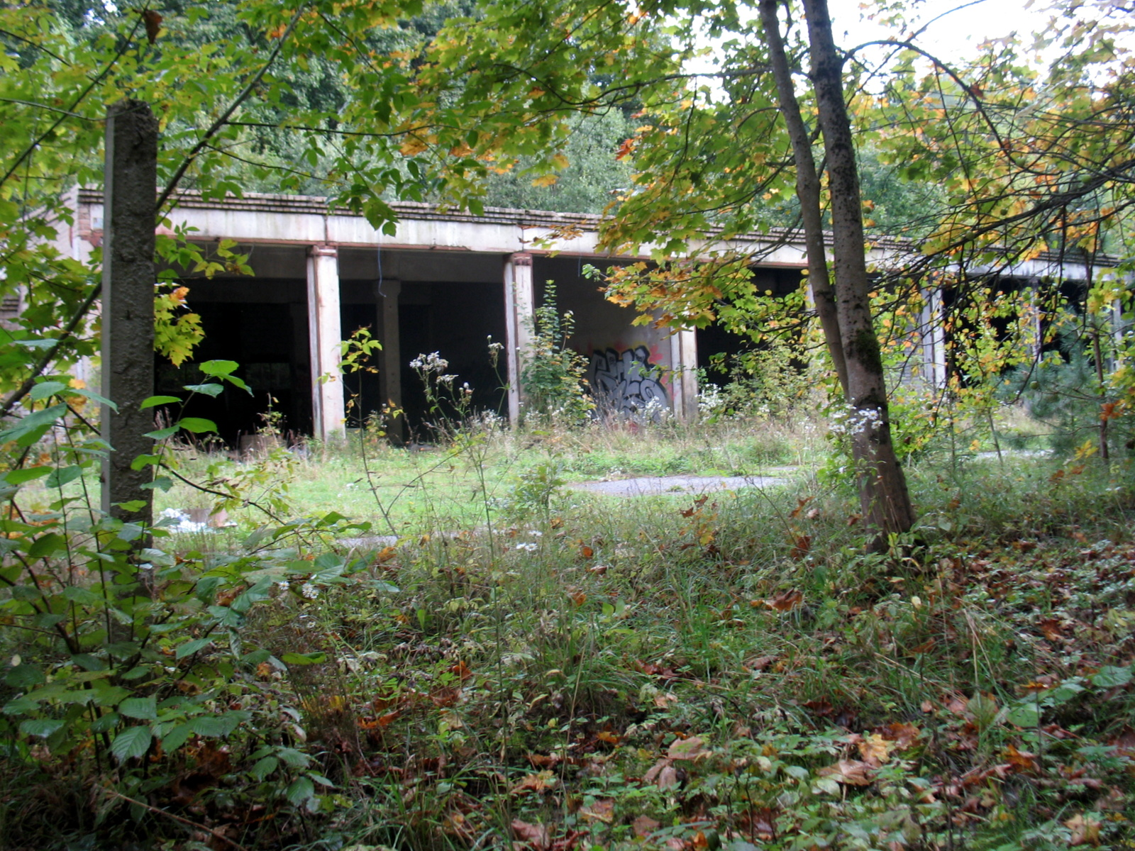 Разваліны ў Бурбішках (Burbiškės)